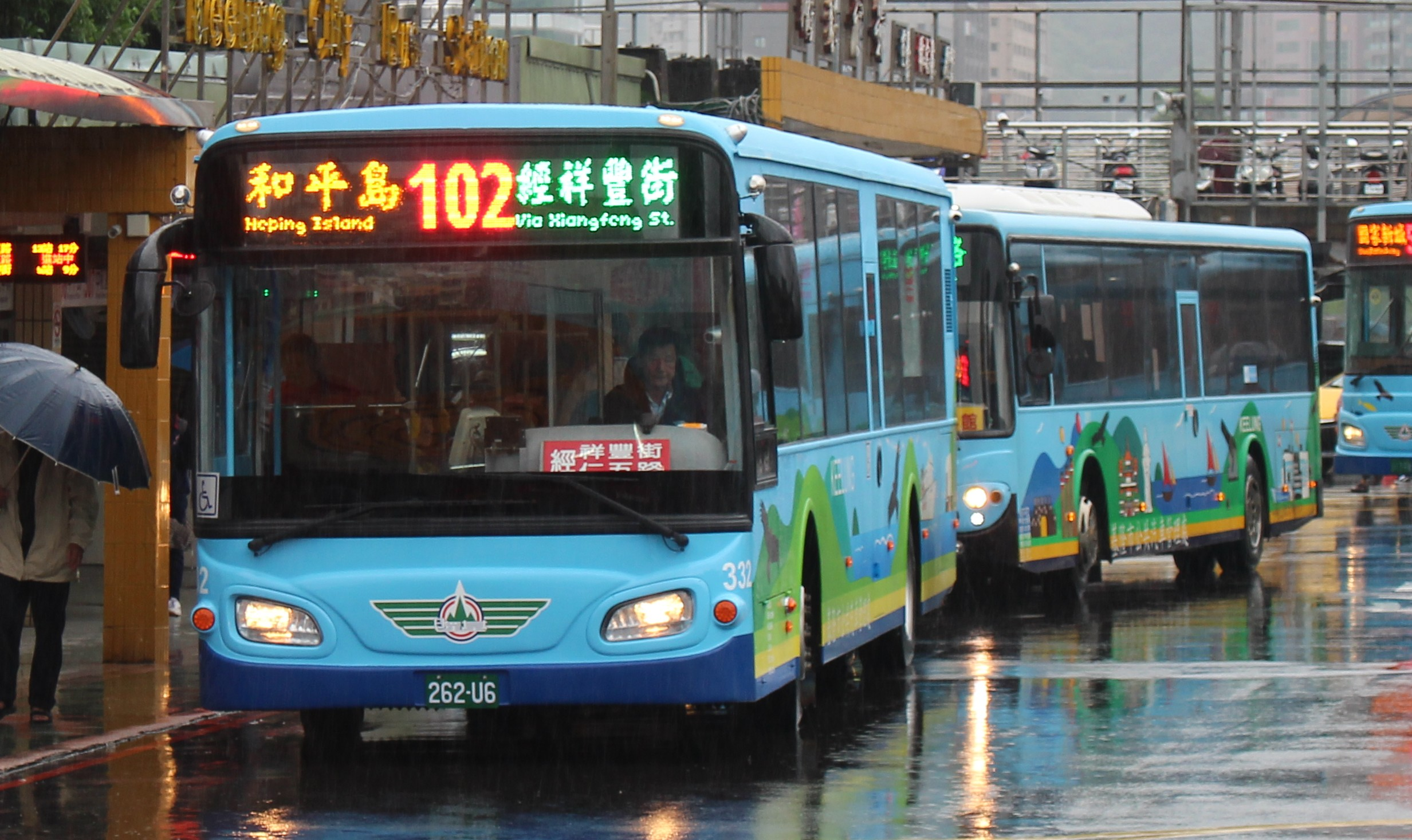 基隆市公共汽車管理處2016年日野HS8JRVL-UTF大客車262-U6行駛102線，雨中停靠基隆市公車總站。